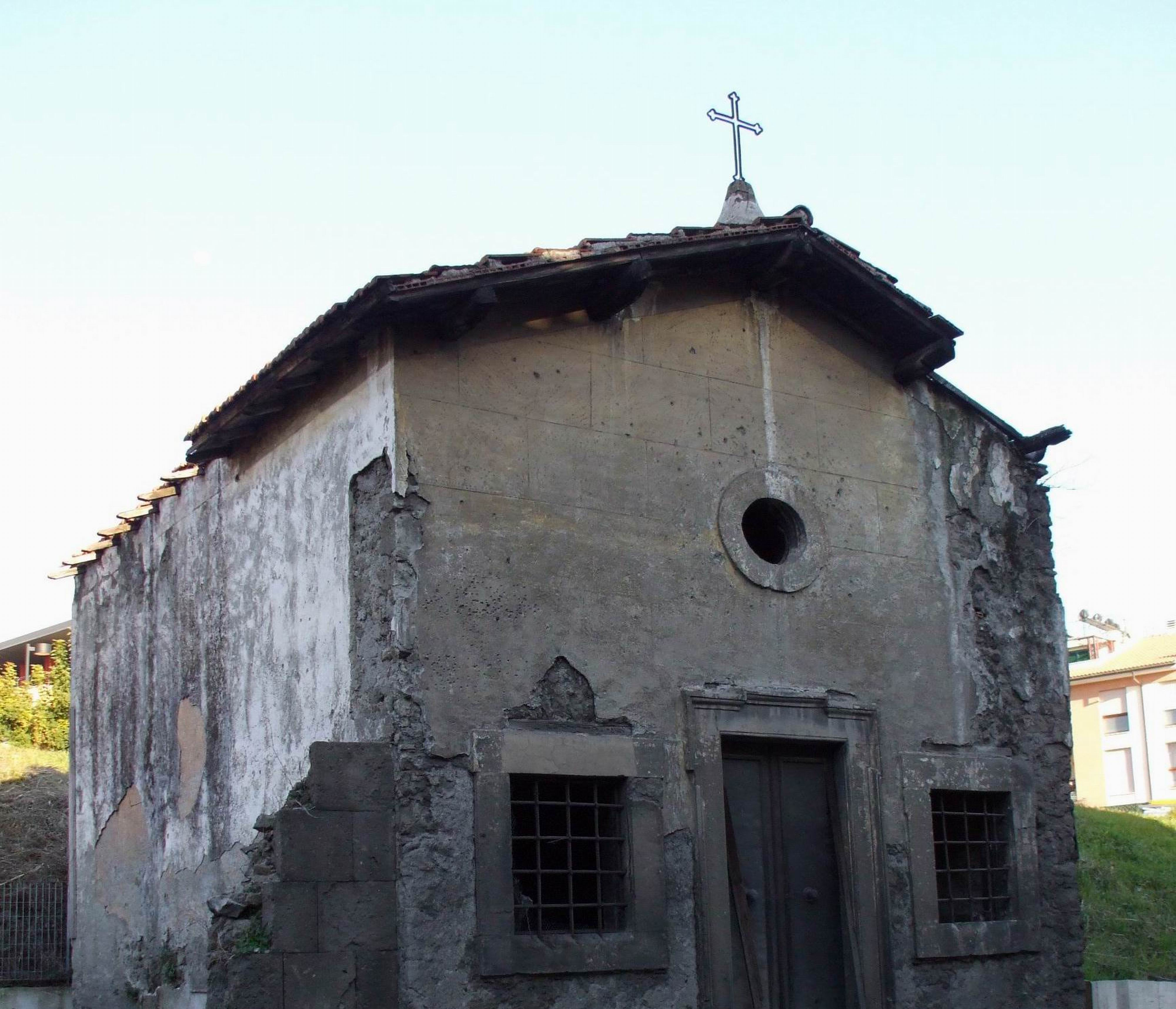 Chiesina Sant'Antonio da Padova - Cecchina(RM)